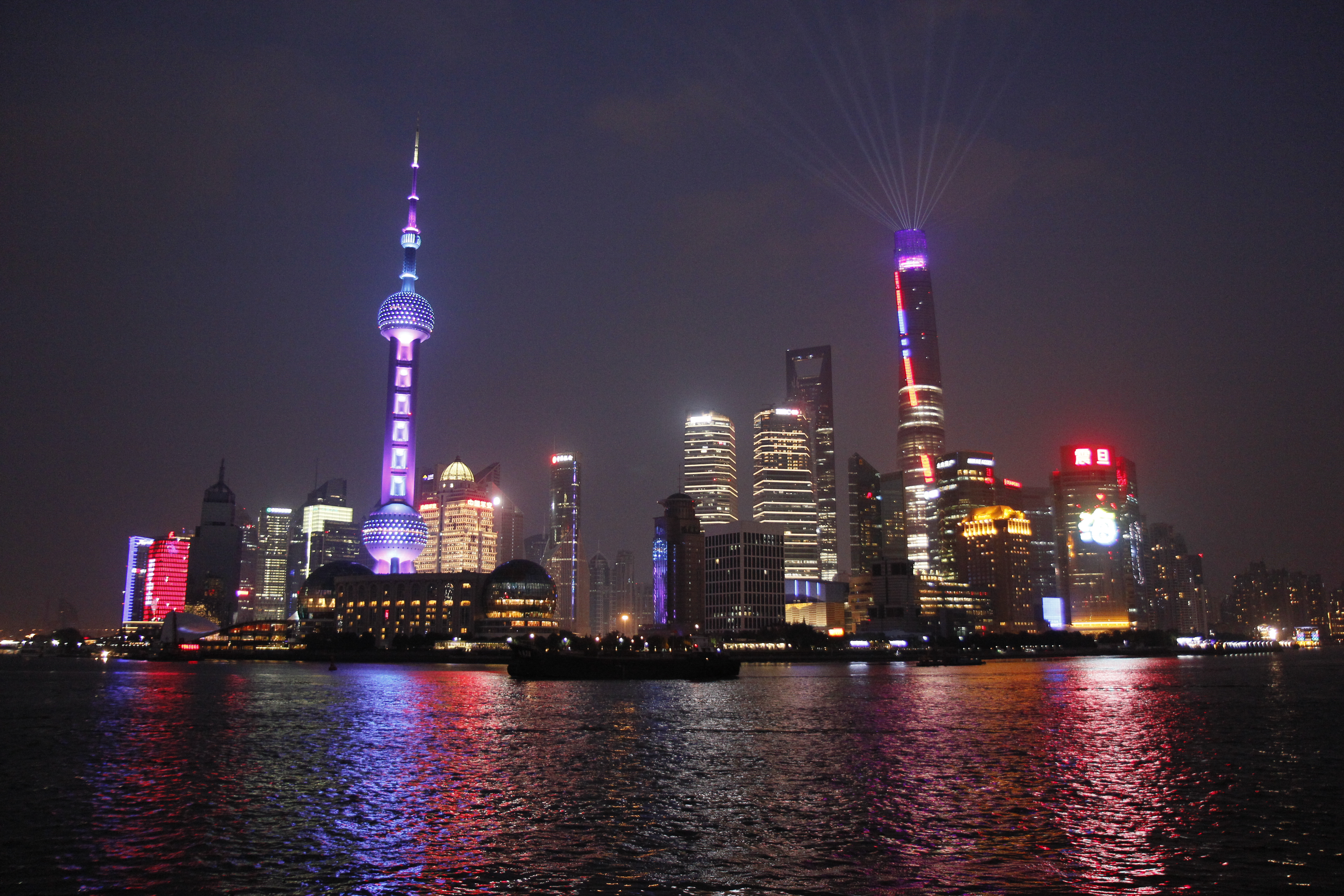 Waitan, Huangpu, Shanghai, China